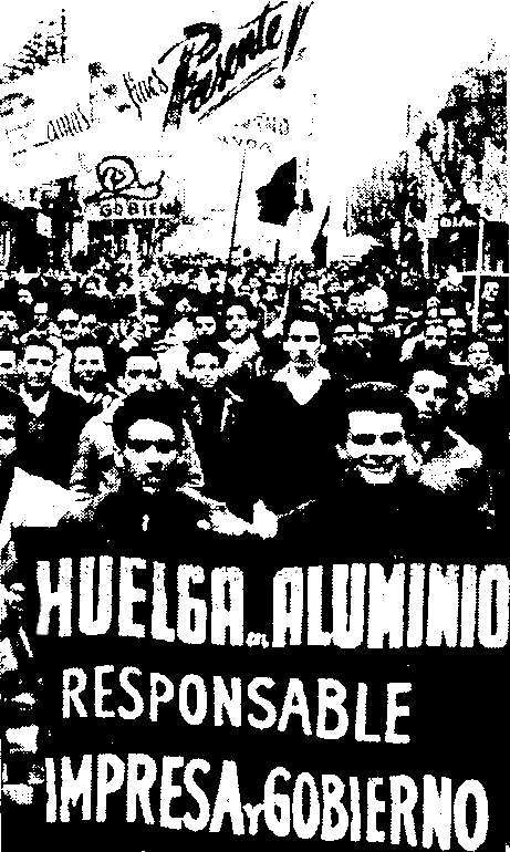 Sciopero dei lavoratori dell'alluminio in Uruguay nei primi anni '60